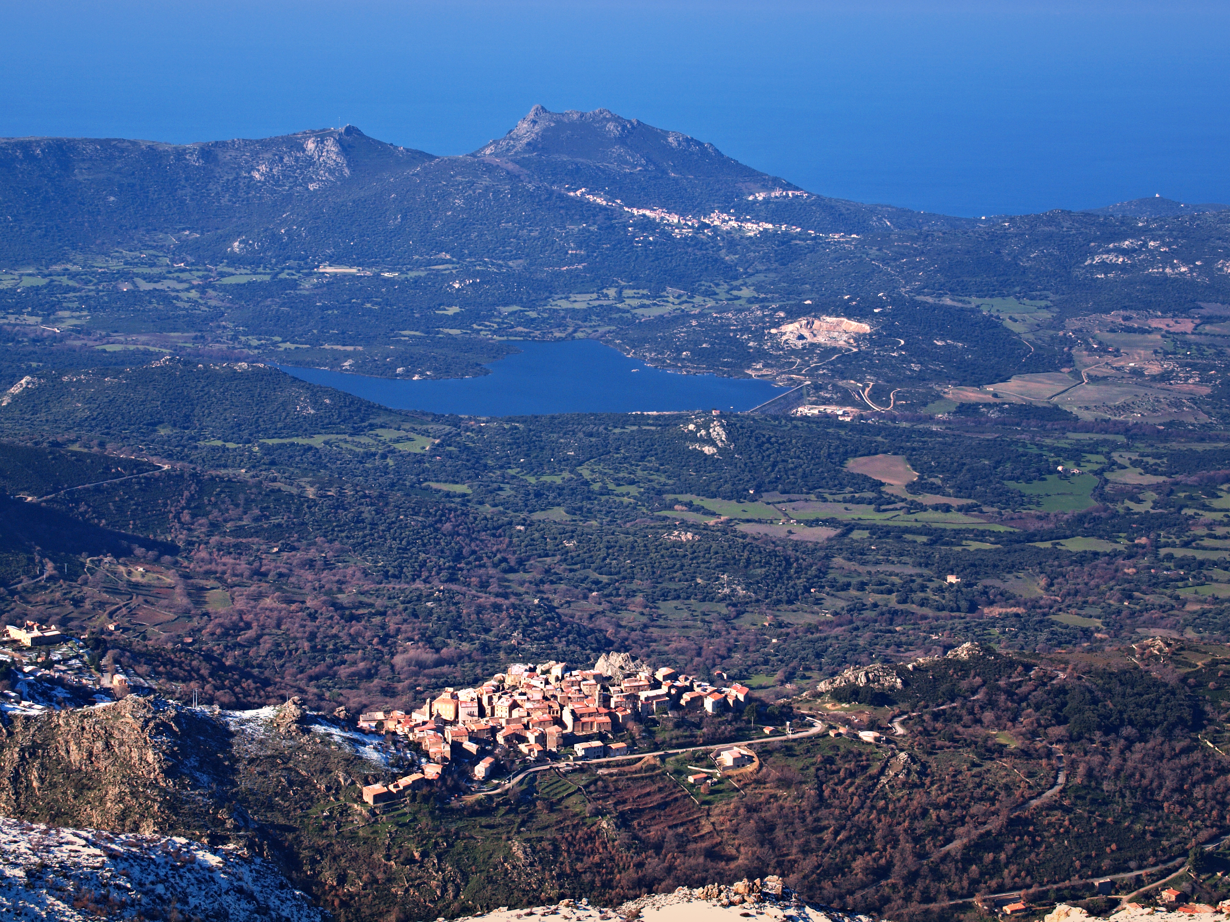 Speloncato (Corse) - Plaine du Regino depuis la route du col de Battaglia